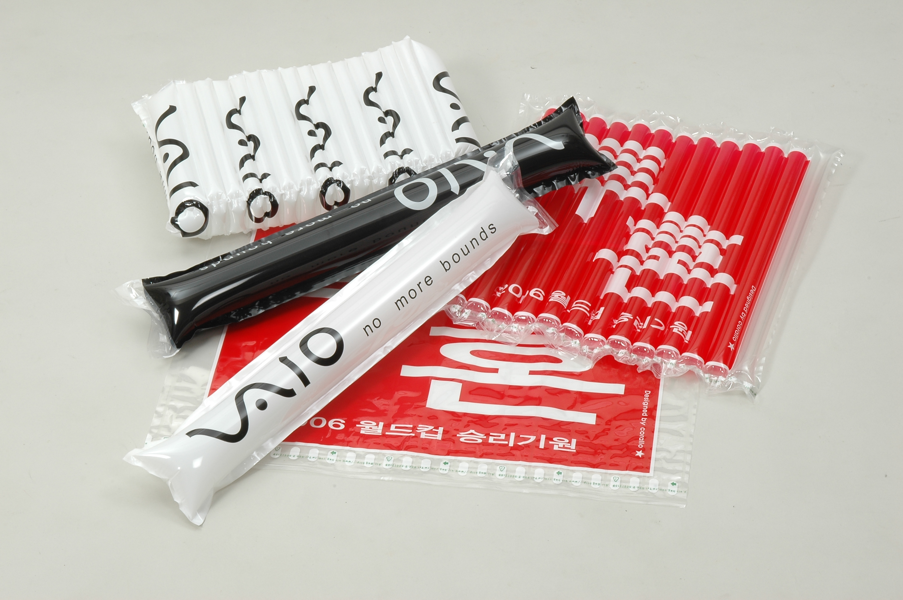 充氣緩衝材做為舉牌或加油棒。